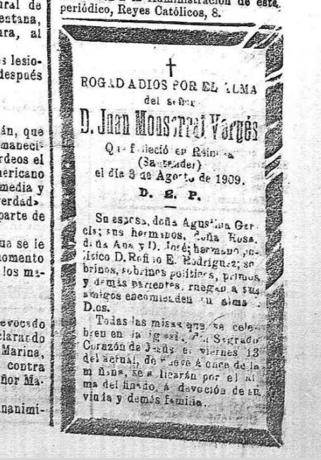 Fuente documental de los nombres de la familia y el hecho de que esté casado.